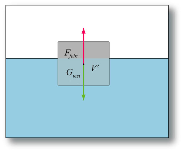 Ábra Arkhimedész törvényének magyarázatához